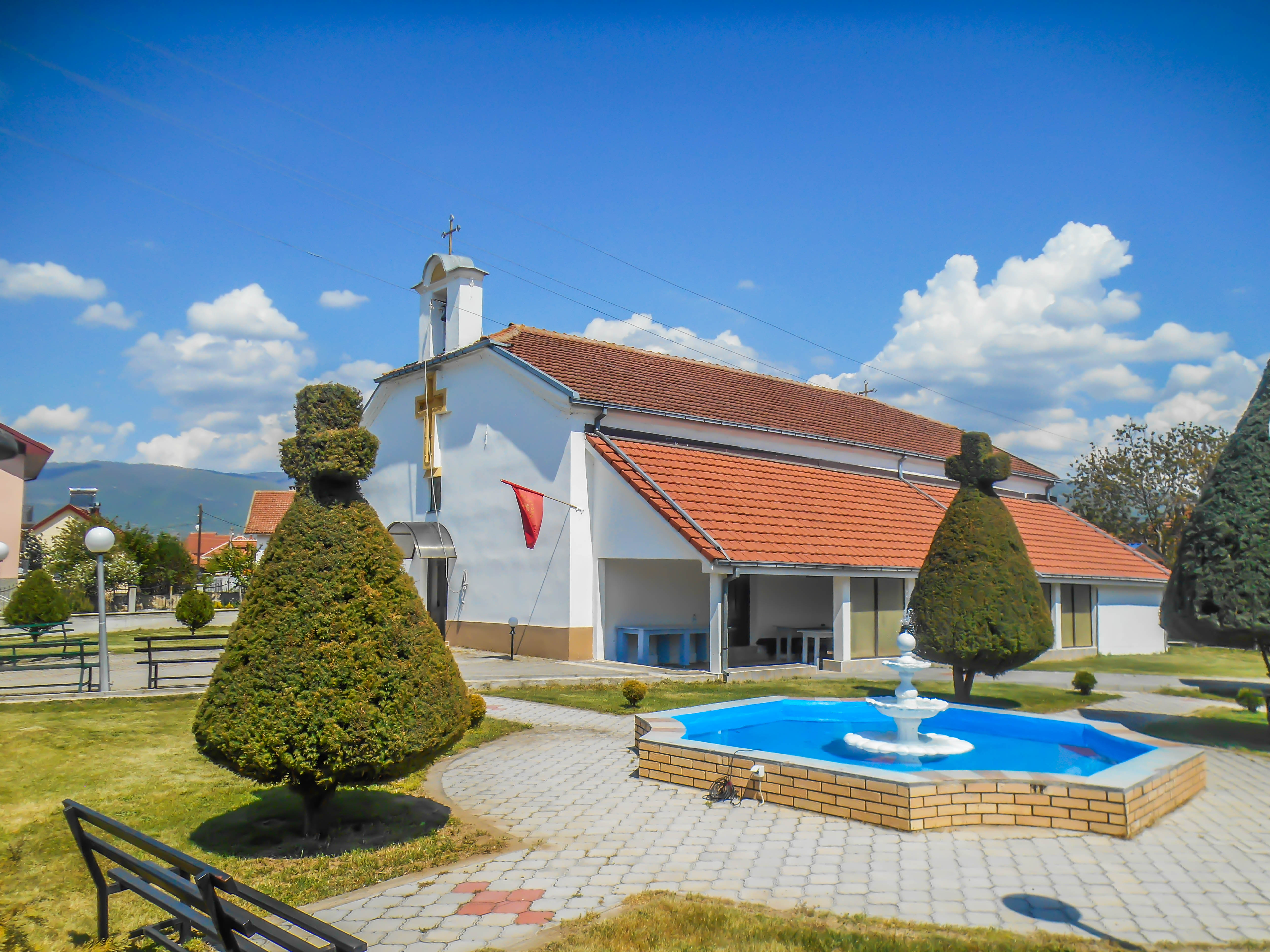 Црква „Успение на Пресвета Богородица“ - Секирник